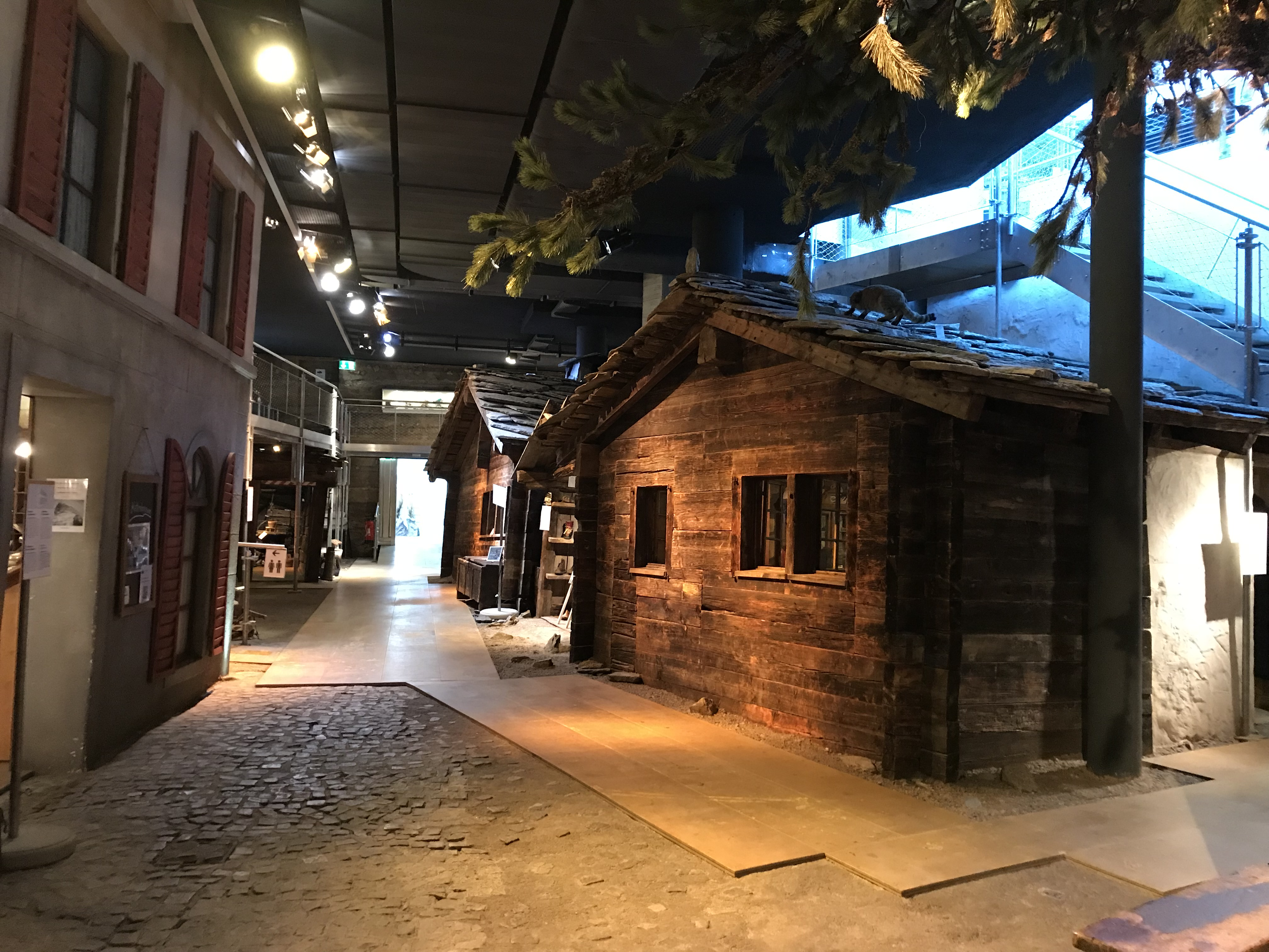 Matterhorn Museum in Zermatt im unterrirdischen nachgebauten Dorf